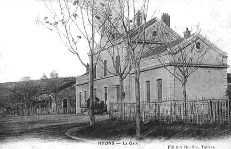 Ancienne carte postale de la gare de Nyons (Drome)